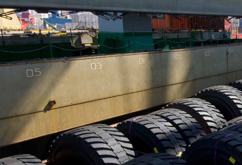 Carga Suelta CCNI